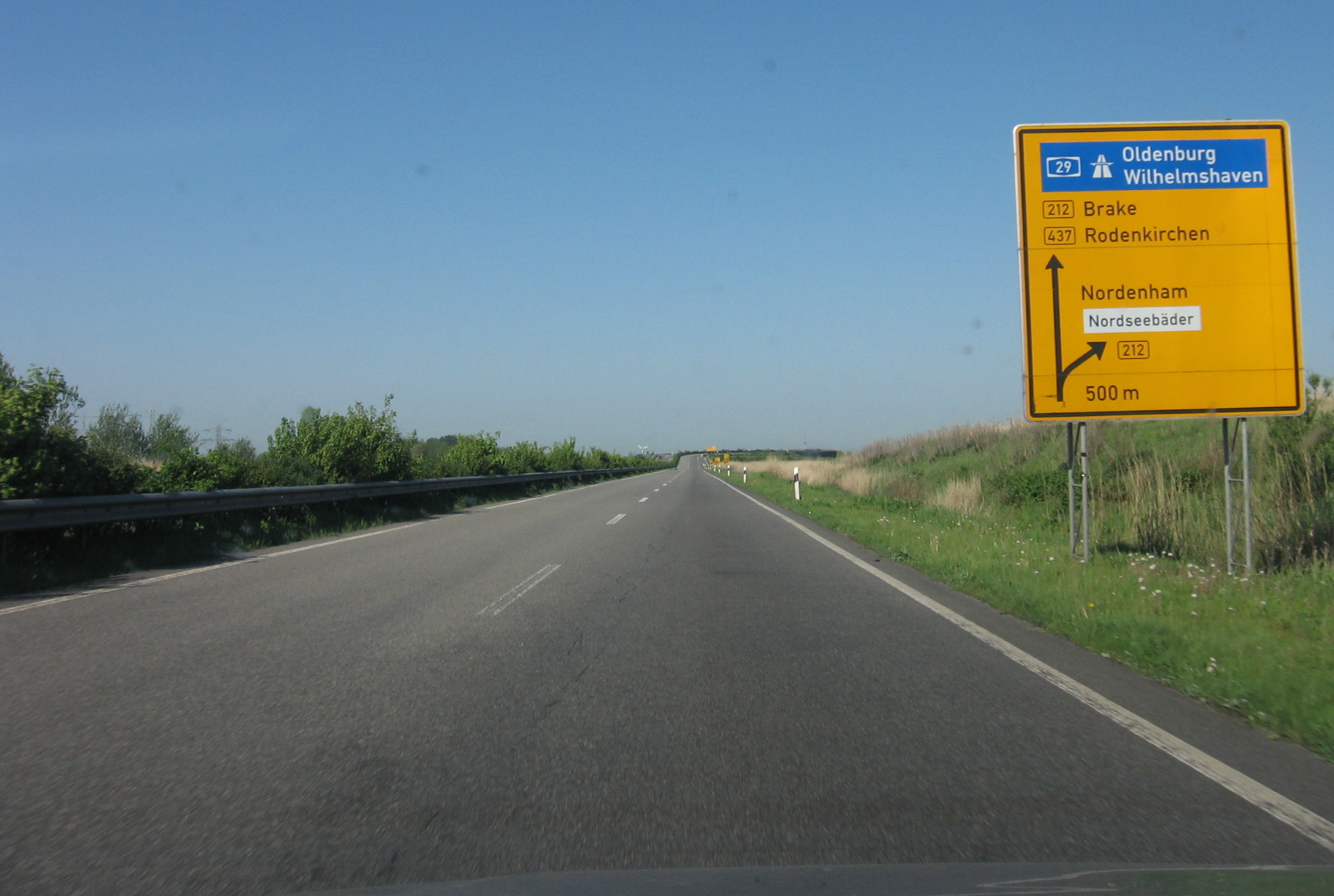 Bundesstraße 437, near Wesertunnel